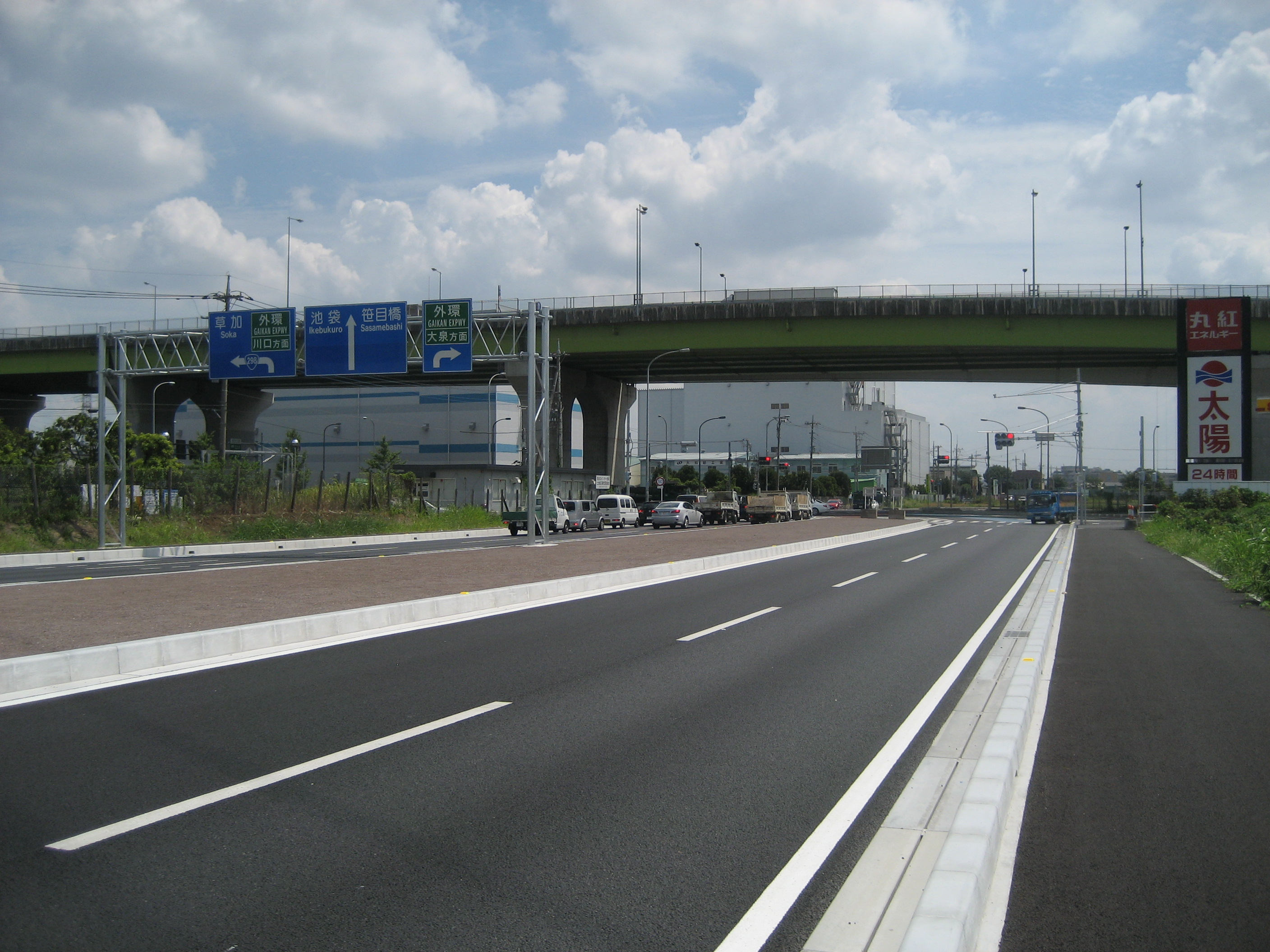 国道254号和光富士見バイパス 埼玉県和光市松ノ木島交差点付近